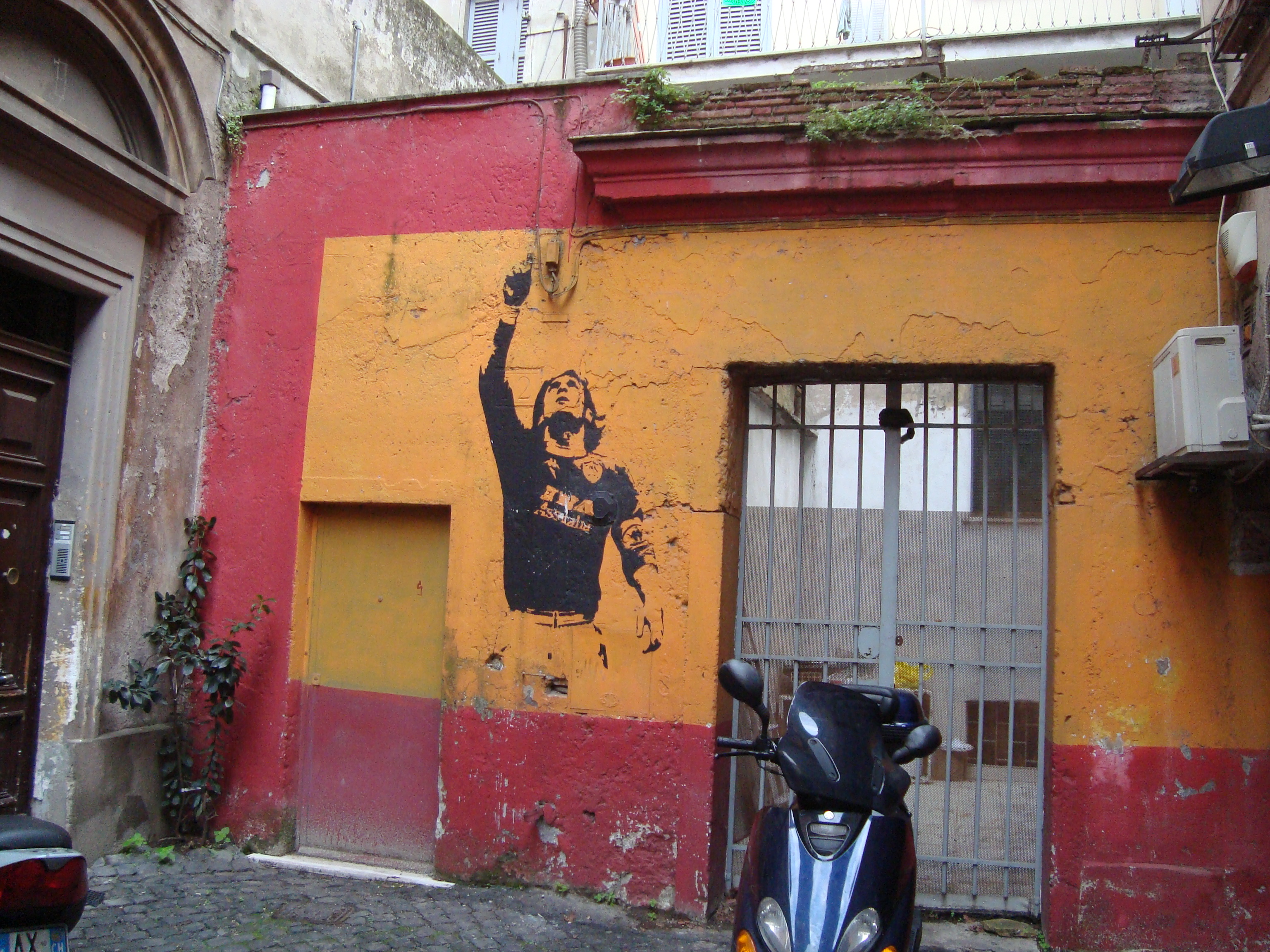 La fresque du mur du rione de Monti à Rome peinte à l'effigie de Francesco Totti lors du Scudetto de l'AS Roma en 2001